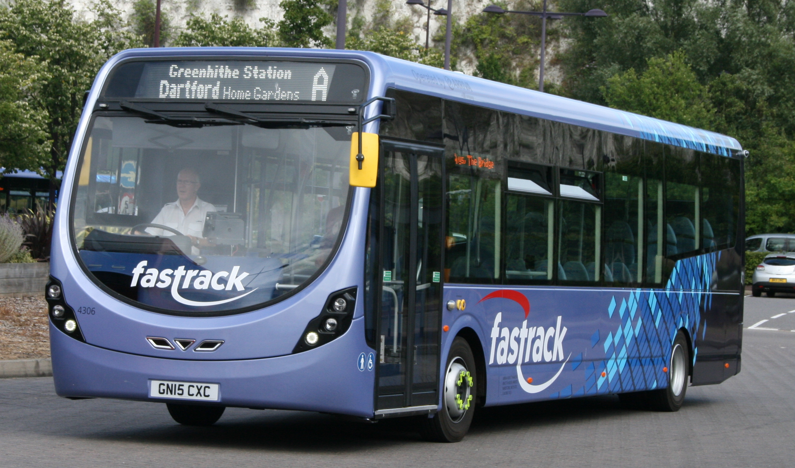 GN15 CXC